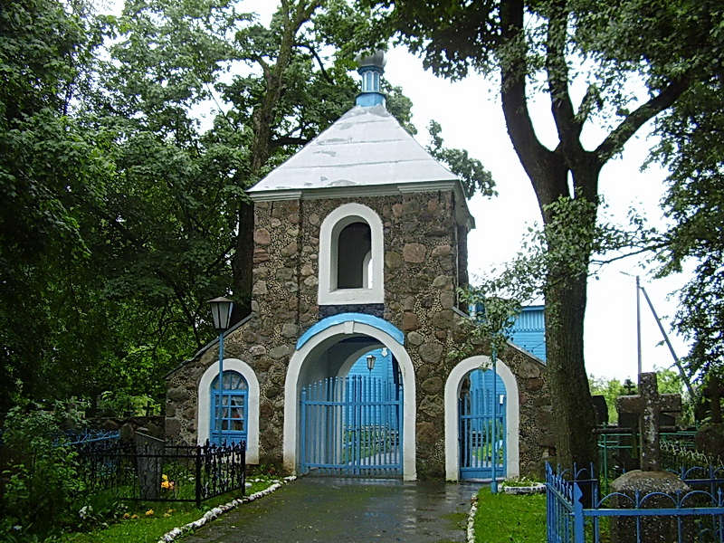 Клецк. Свята-Пакроўская царква